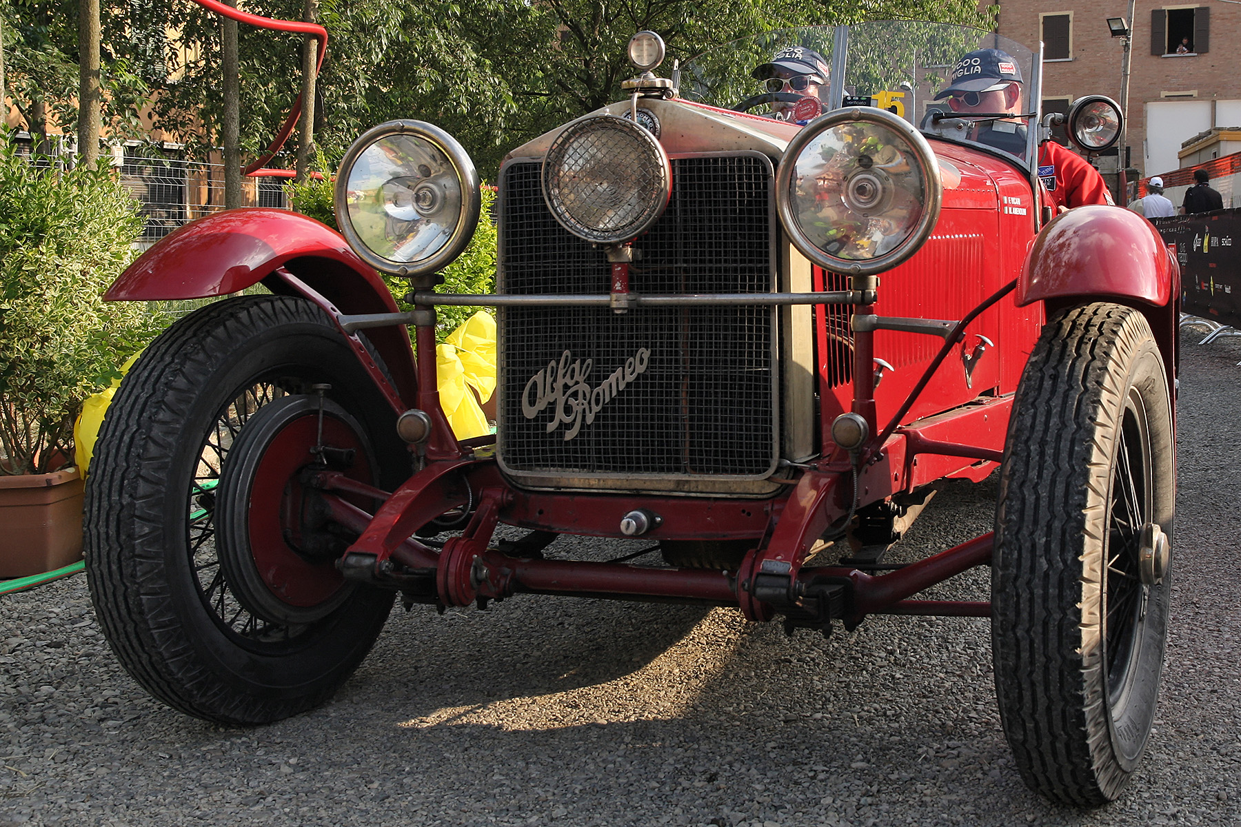 Mille Miglia 2011